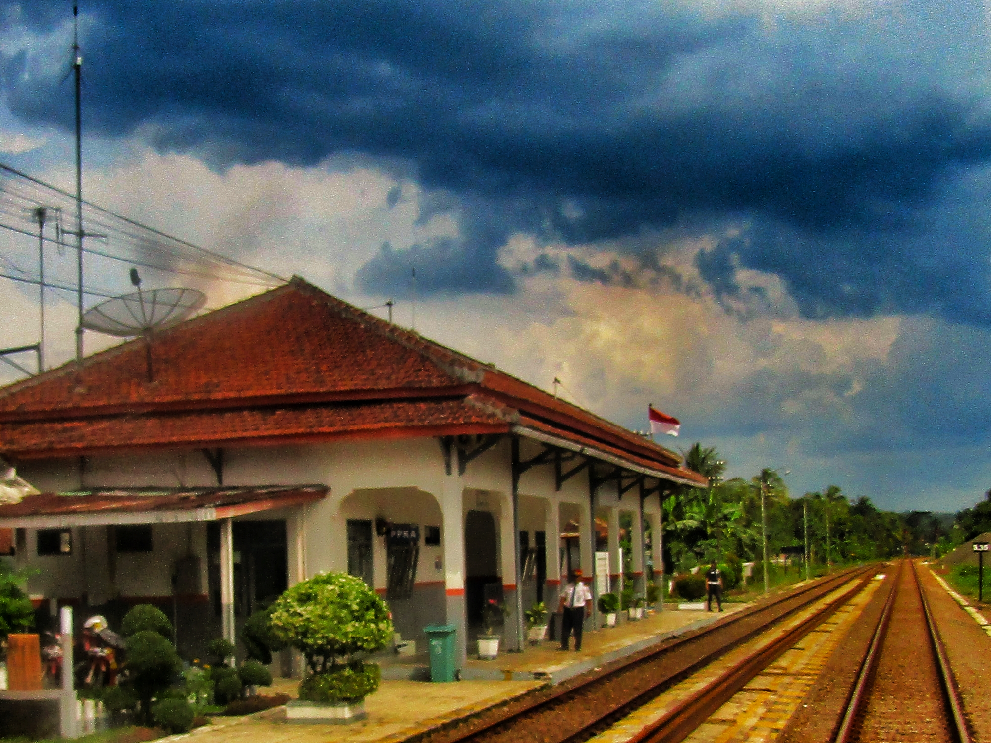 Bangunan utama Stasiun Cipari, 2020